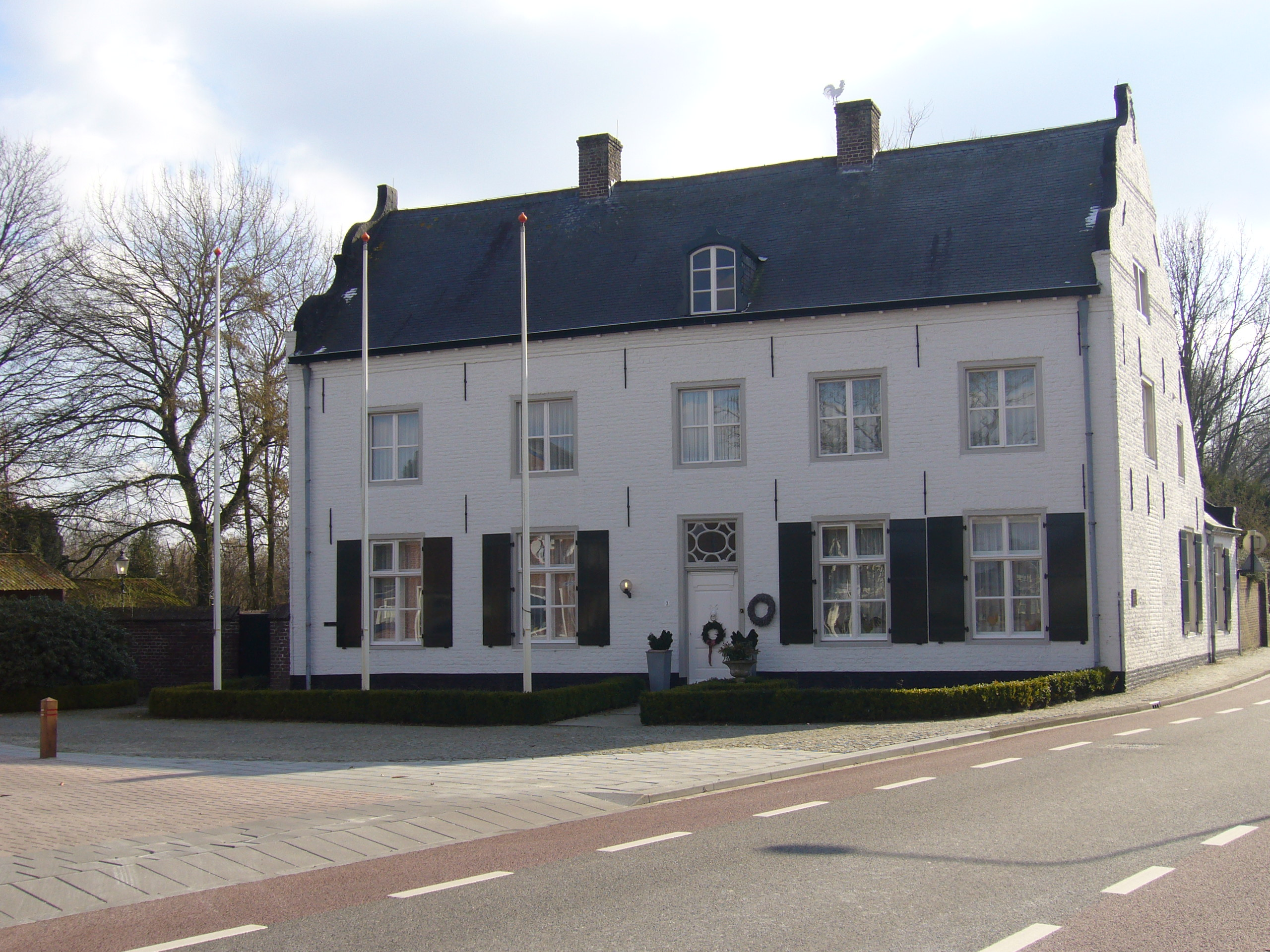 Huize Meerlo, Mgr Jenneskensstraat 2, Meerlo